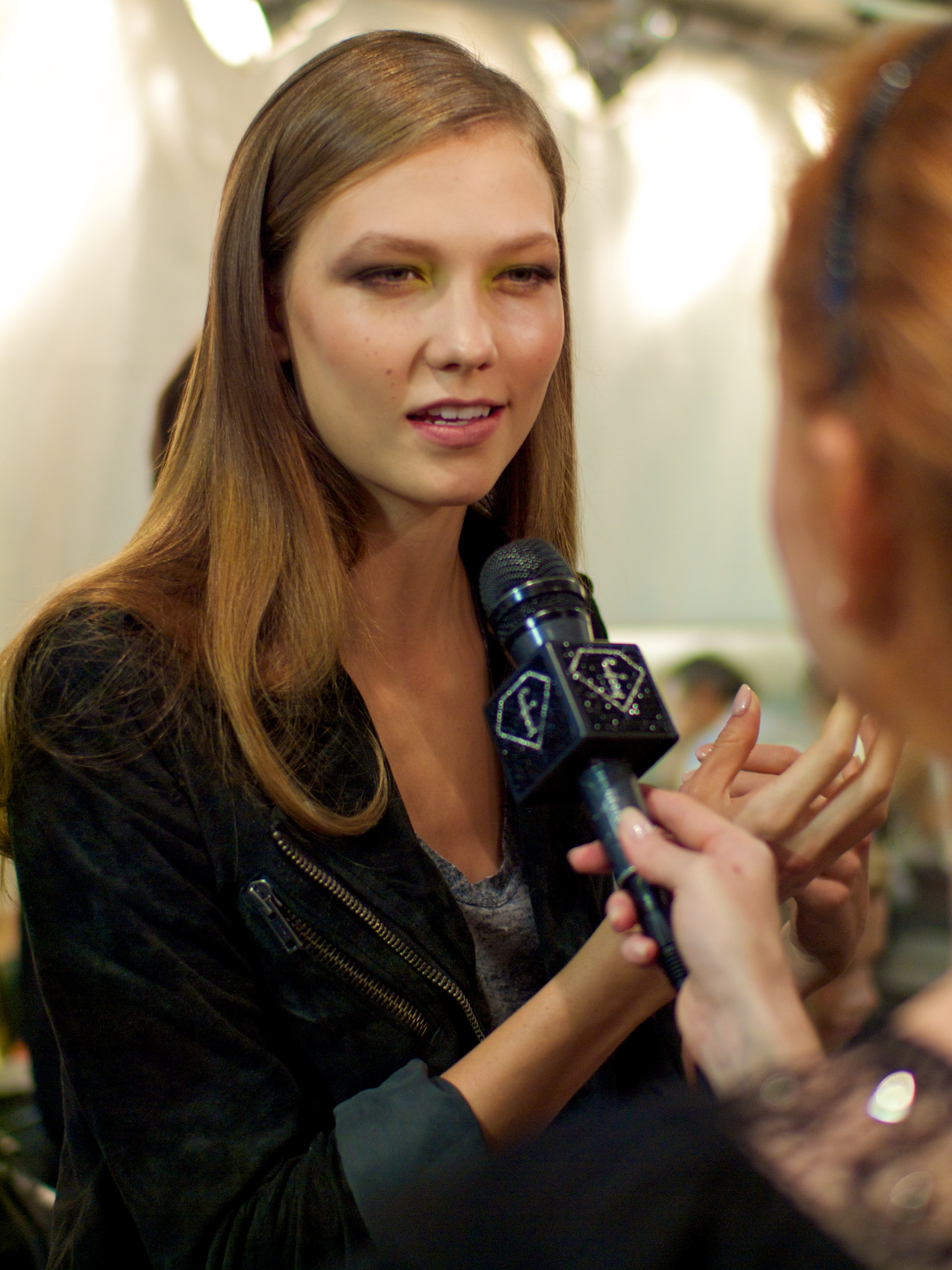 Elie Saab backstage pap p-é 2011